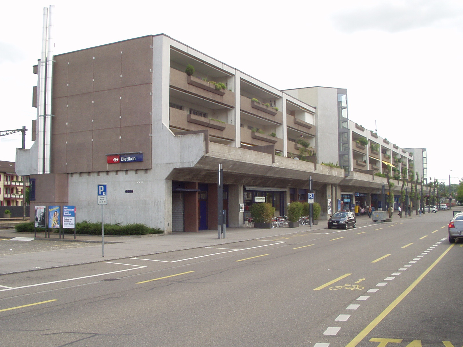 Bahnhofgebäude des Bahnhofes Dietikon von der Strassenseite gesehen